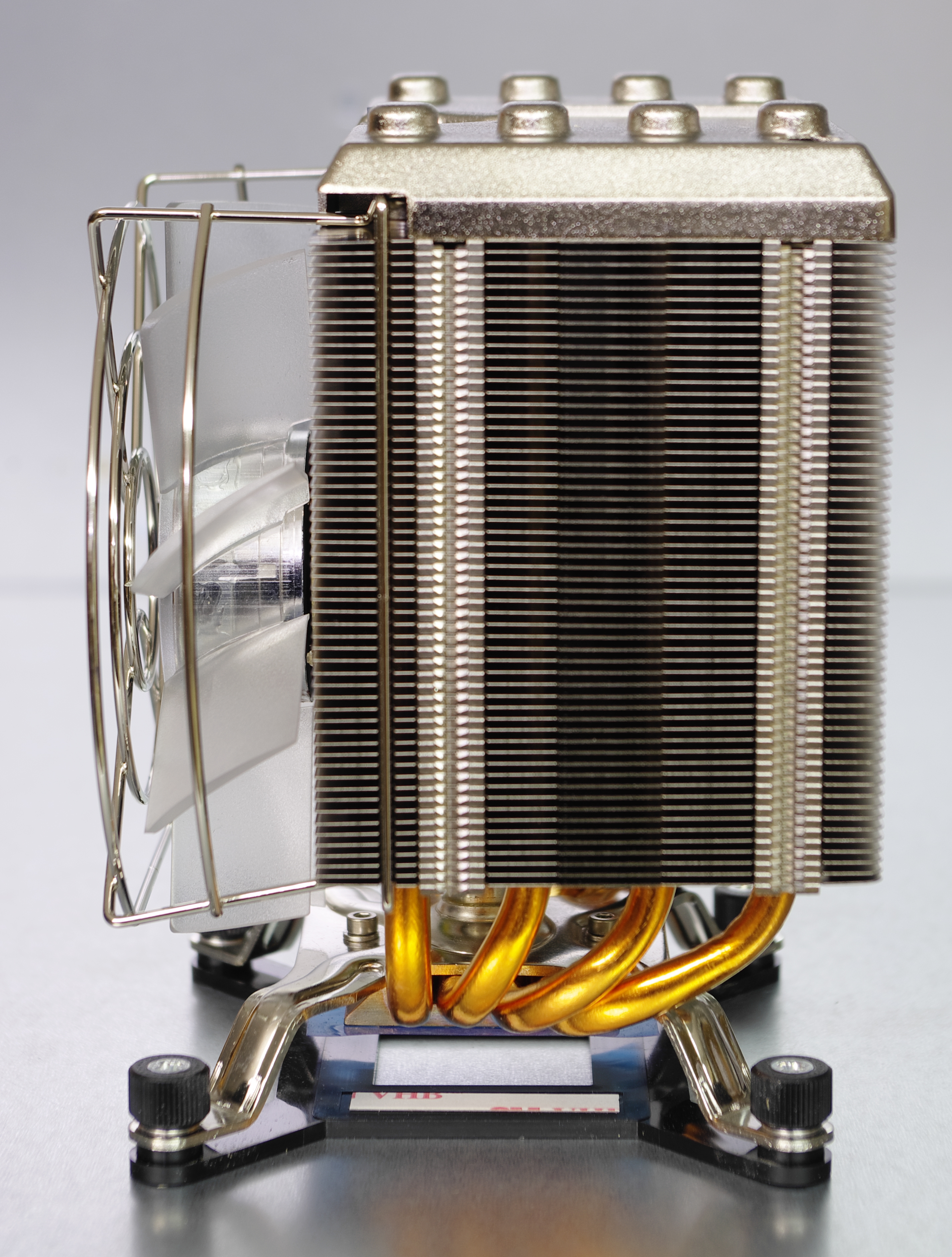 Prozessorkühler Towerbauform mit Kupferboden und Heatpipes